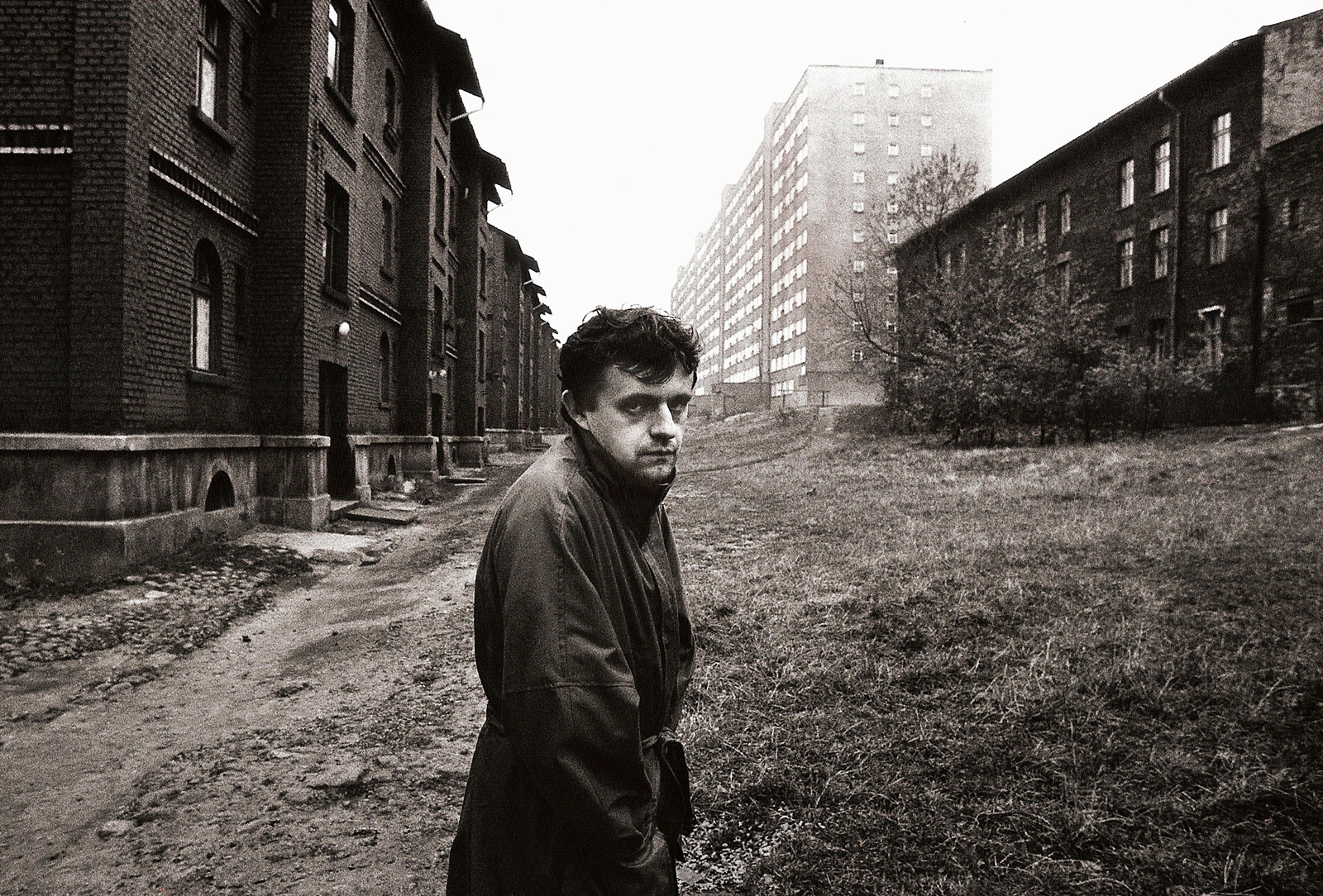 Mieczysław Wielomski (1948–2018) – polski artysta fotograf